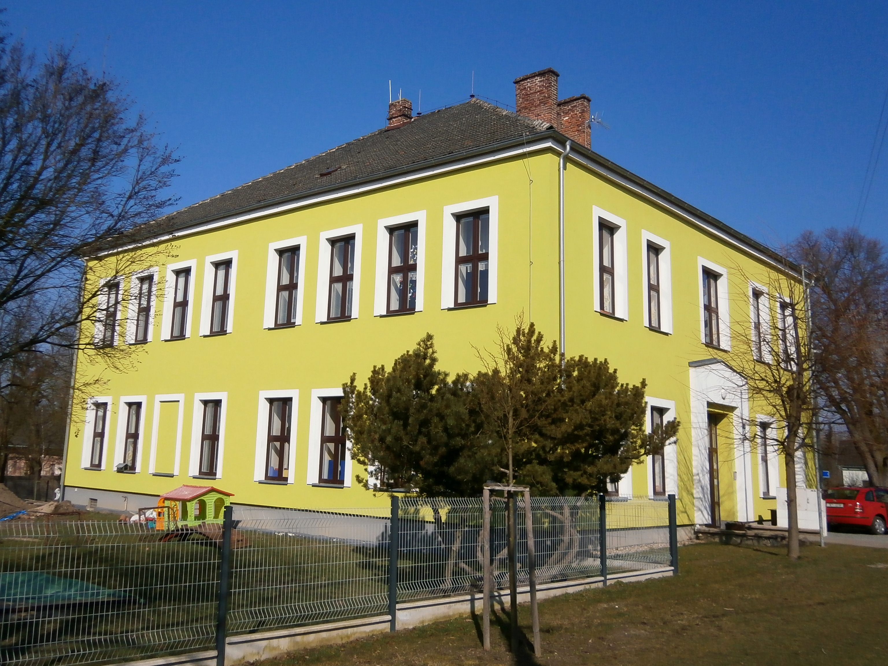 Škola (Sedlice)